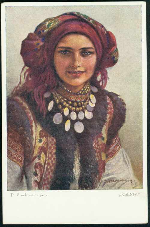 Гуцулка.Ксеня: Гуцули